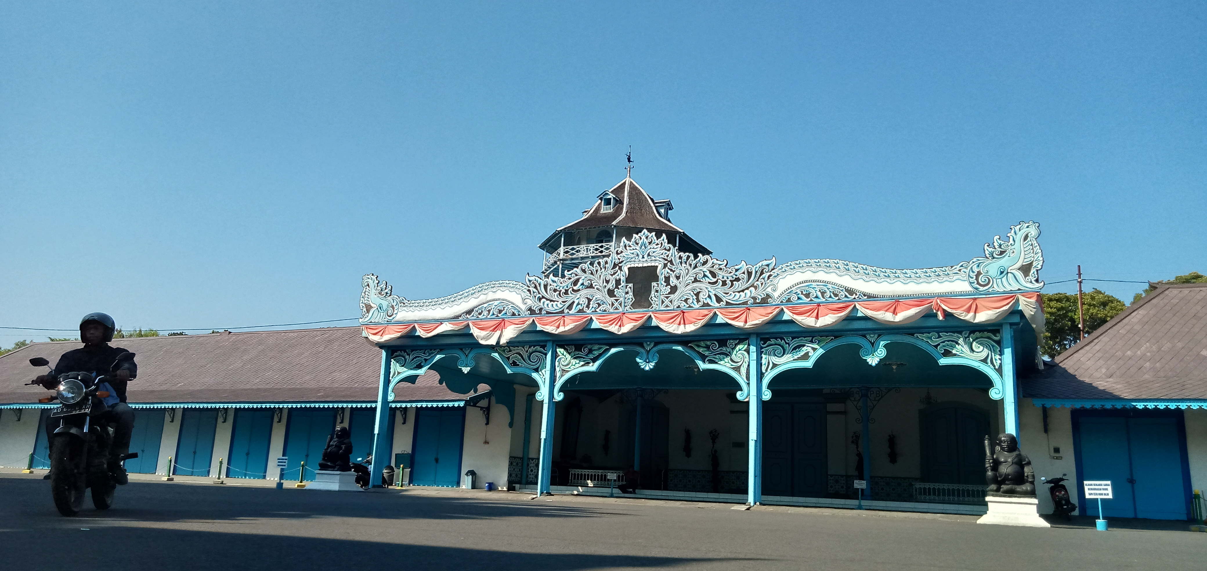 masa lalu